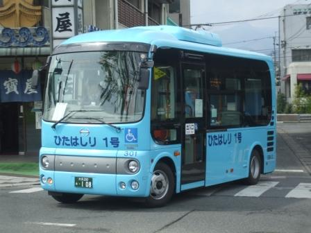 日田市「ひたはしり号」